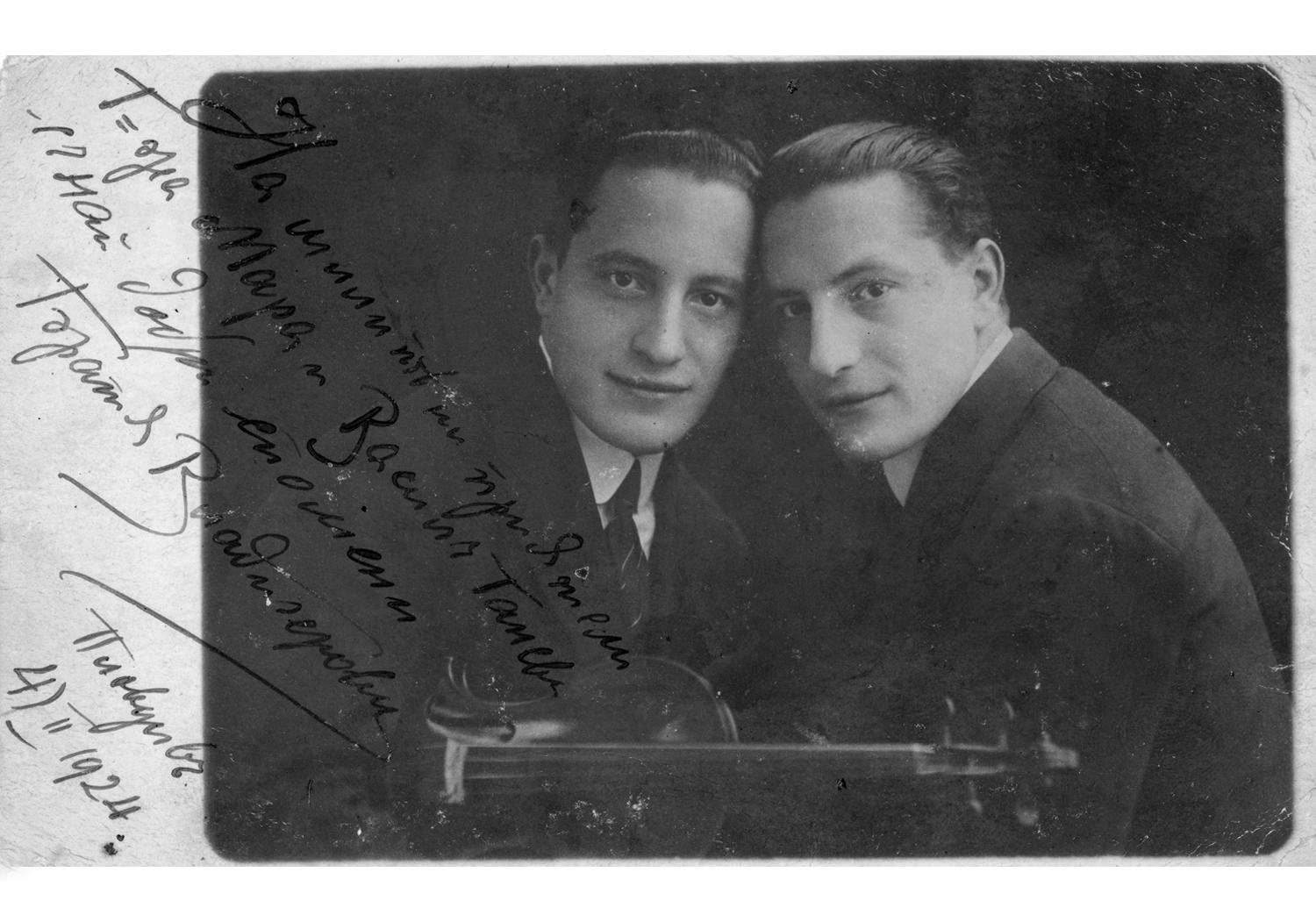 Снимка с посвещение на Панчо и Любен Владигерови на техните приятели Васил и Мария Ганеви, на които са били чести гости в дома на Димитър Янков Ганев (Ганеолу).